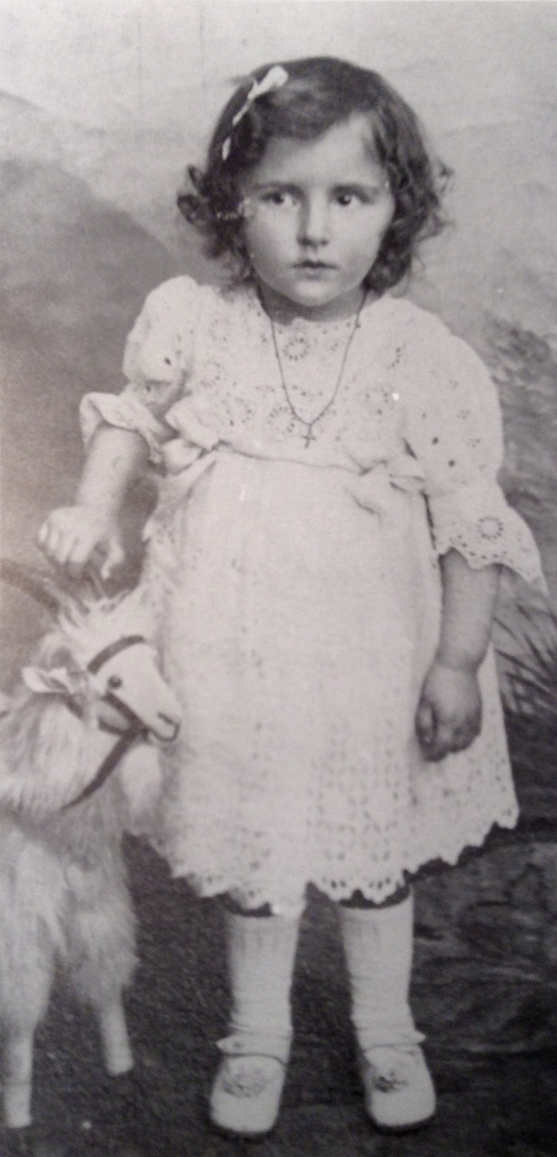 La résistante Laure Gatet à l'âge de deux ans (1915).